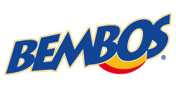 Logo de Bembos